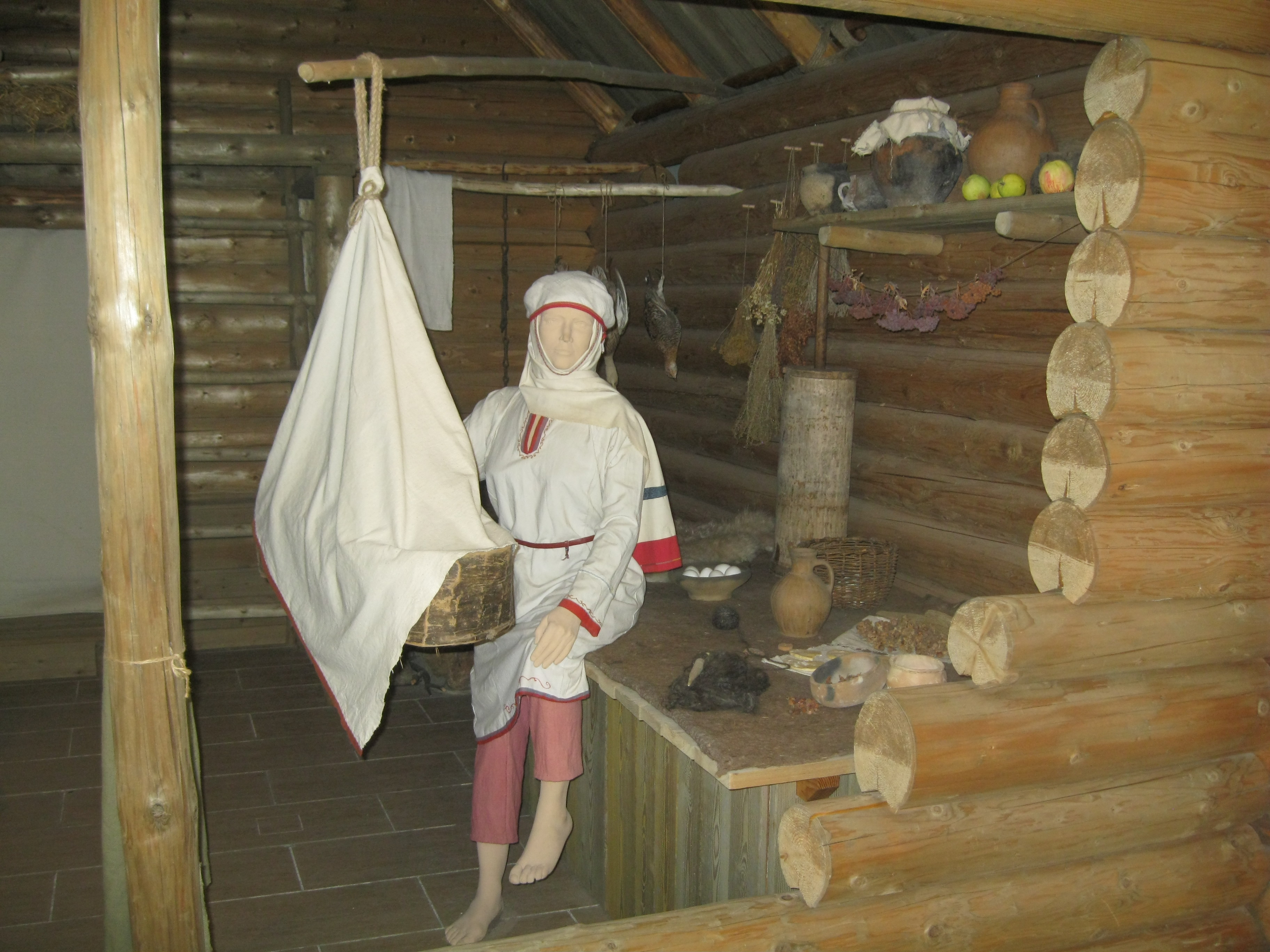 Жилая постройка волжских булгар. XI-XII вв. Национальный музей Республики Татарстан